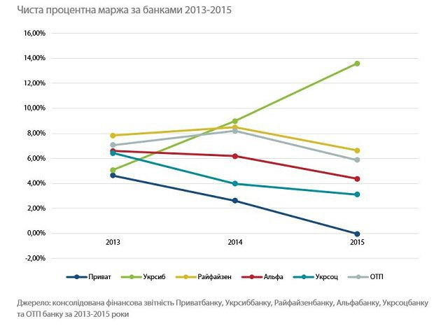 Чиста відсоткова маржа за банками 2013-2015